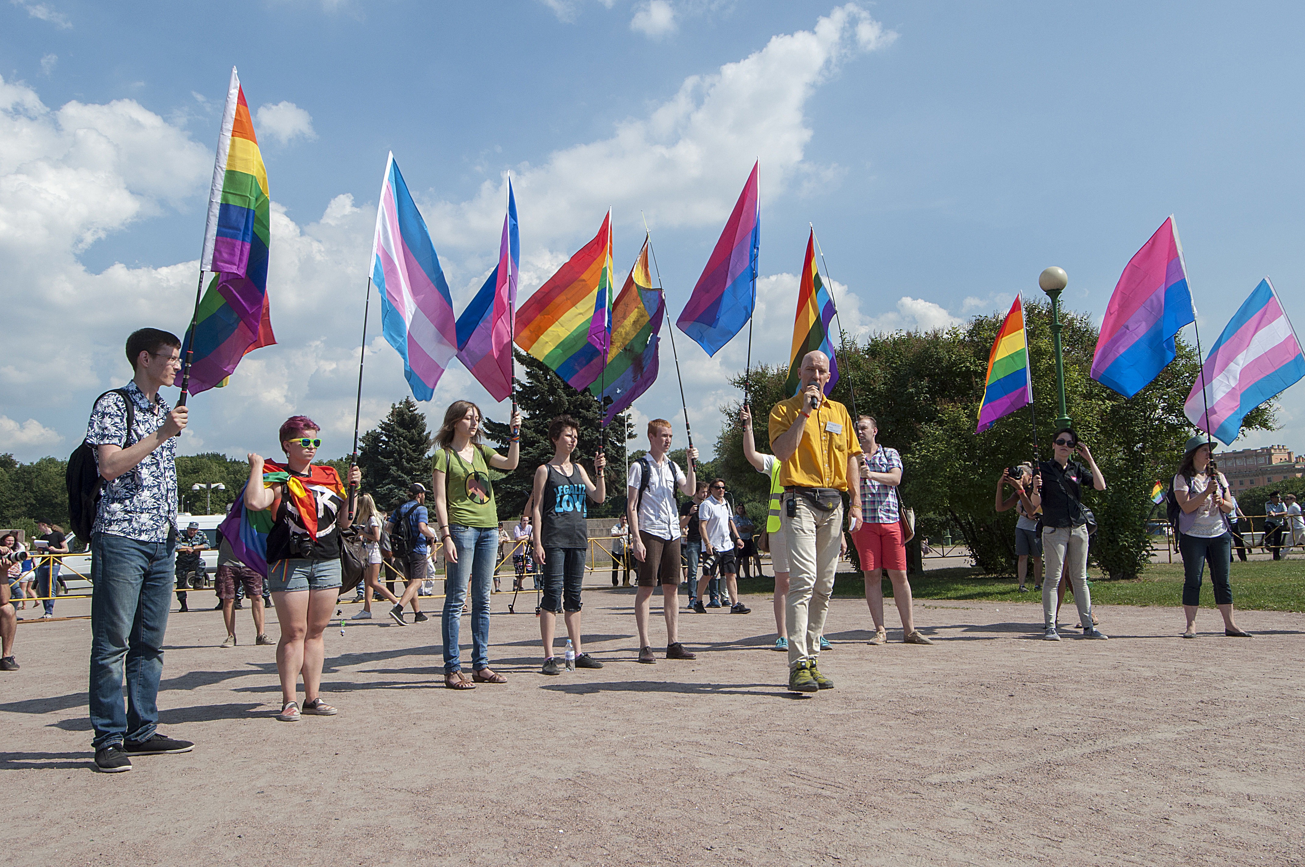 26/07/2014. Санкт-Петербург, Марсово поле. Публичная акция в рамках Пятого Санкт-Петербургского прайда. © Alek Naza